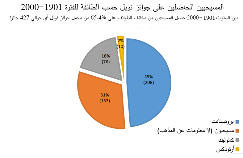 المسيحييون الحاصلون على جائزة نوبل حسب الطائفة